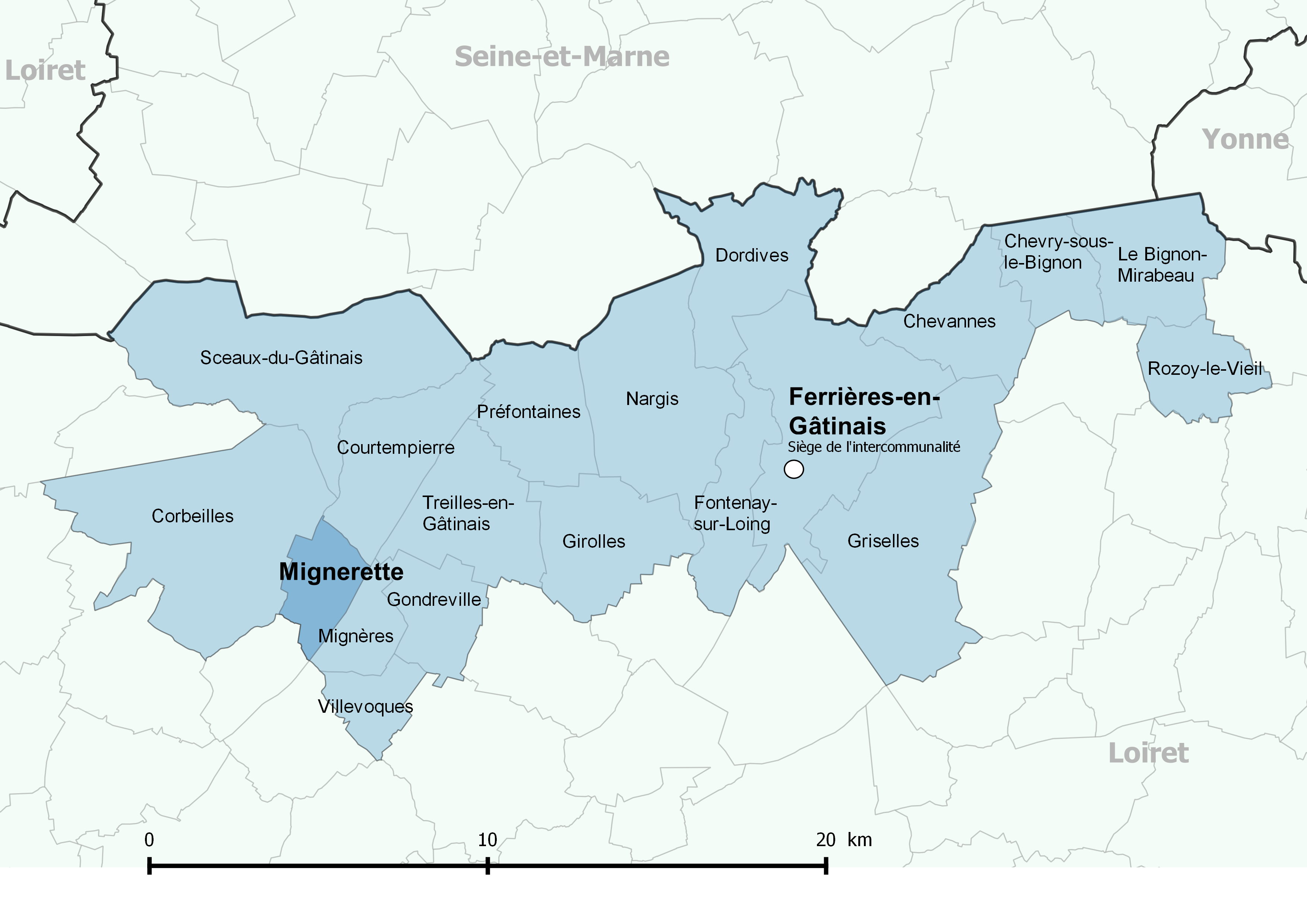 Périmètre de la communauté de communes des Quatre Vallées (Loiret) - Positionnement de la commune de Mignerette.